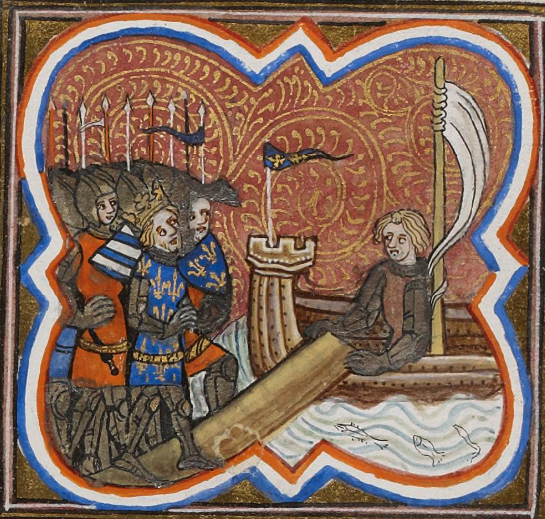 Départ pour la huitième croisade